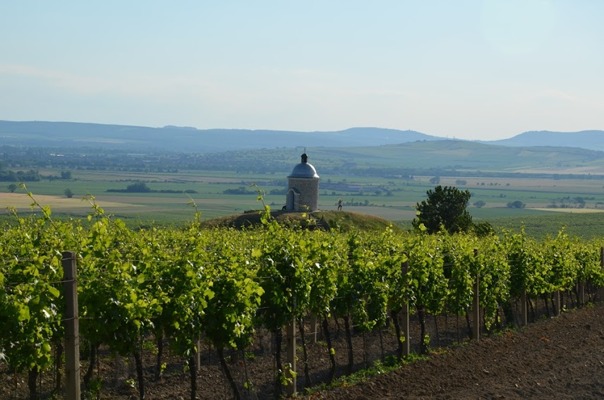 Velké Bílovice, kaple sv. Urbana, Václava, Cyrila a Metoděje